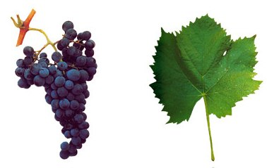 Traube und Blatt der Rotweinsorte 'Tinta_Barroca'